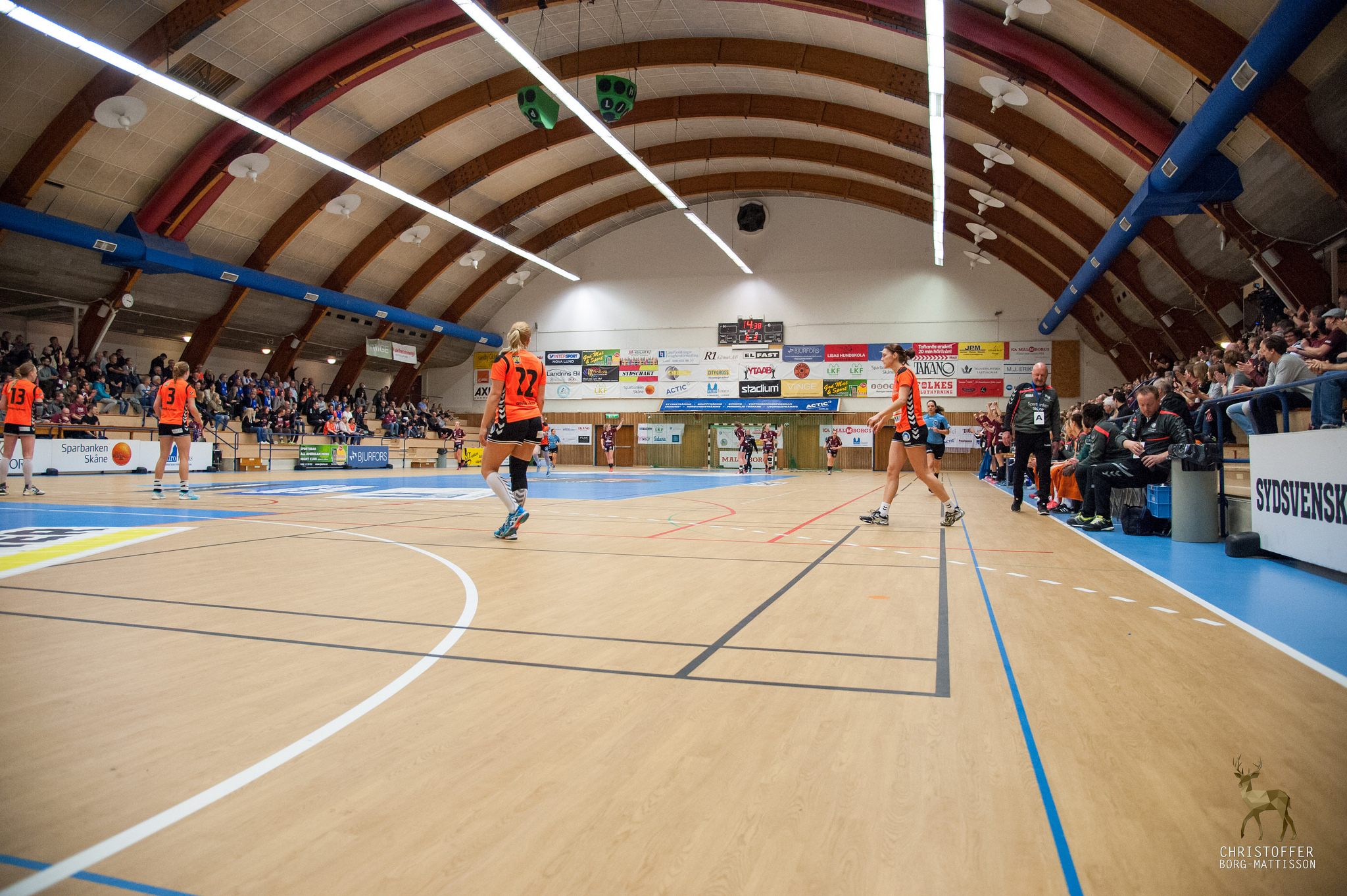 Idrottshallen i Lund är en alternativ spelplats för Lugi Dam.